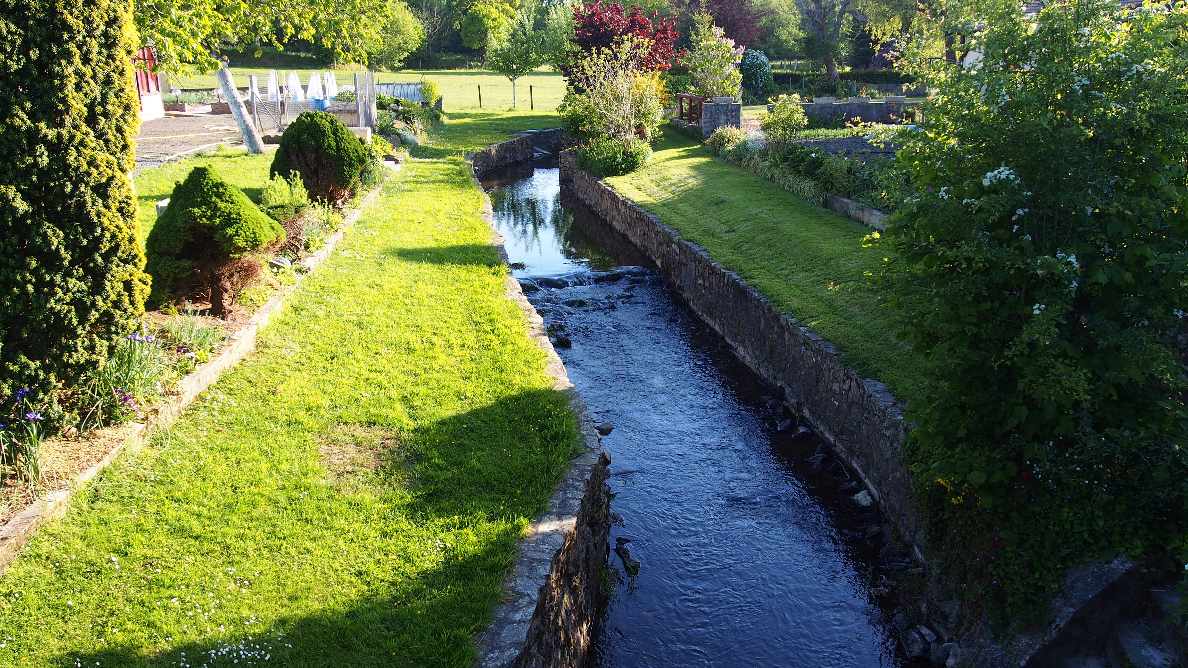 Quibou (Normandie, France). La Joigne à la Joignerie.